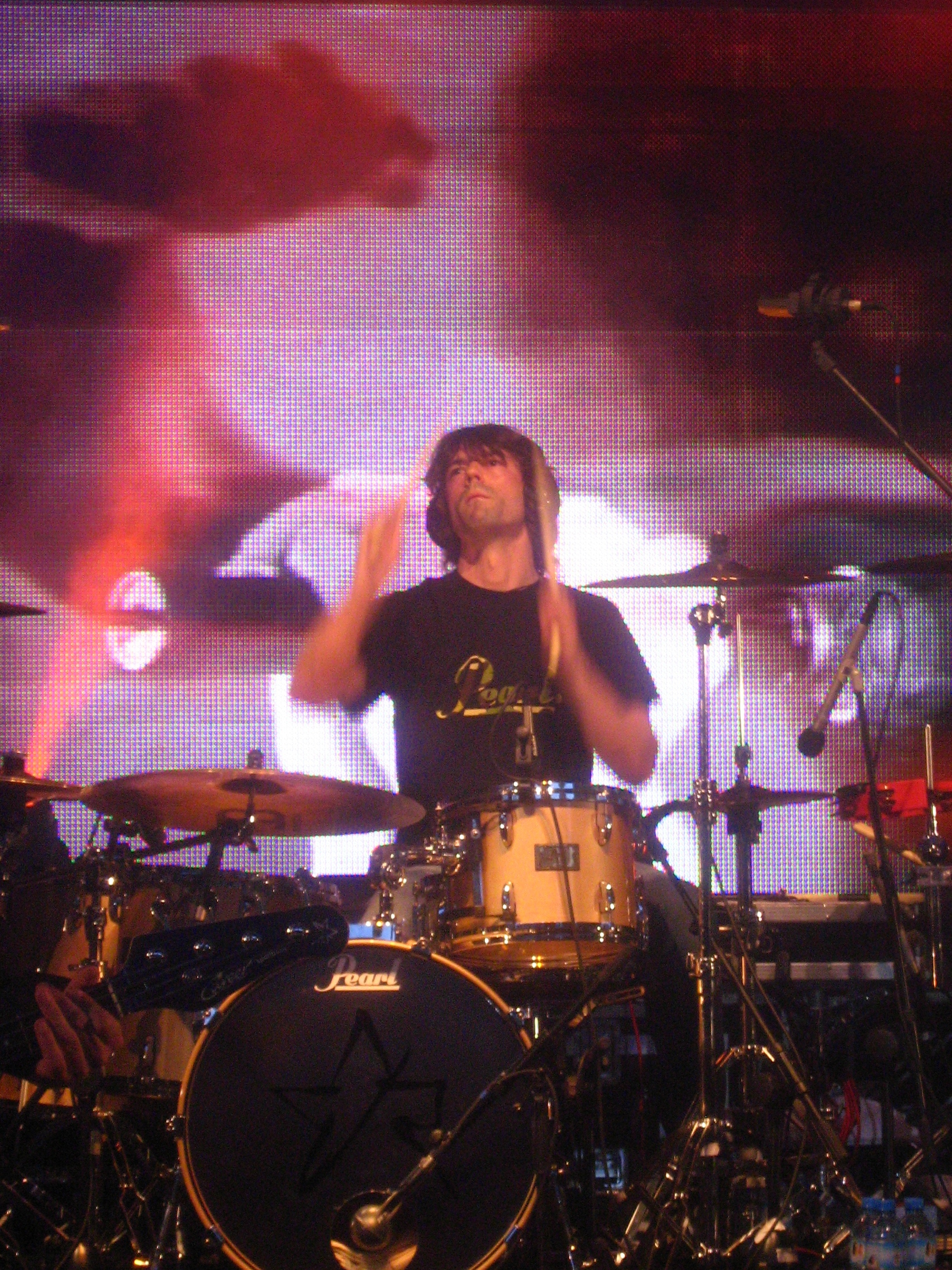 Mike Gommeringer (Reamonn) podczas koncertu w Teatrze Letnim w Szczecinie. 5 lipca 2008.